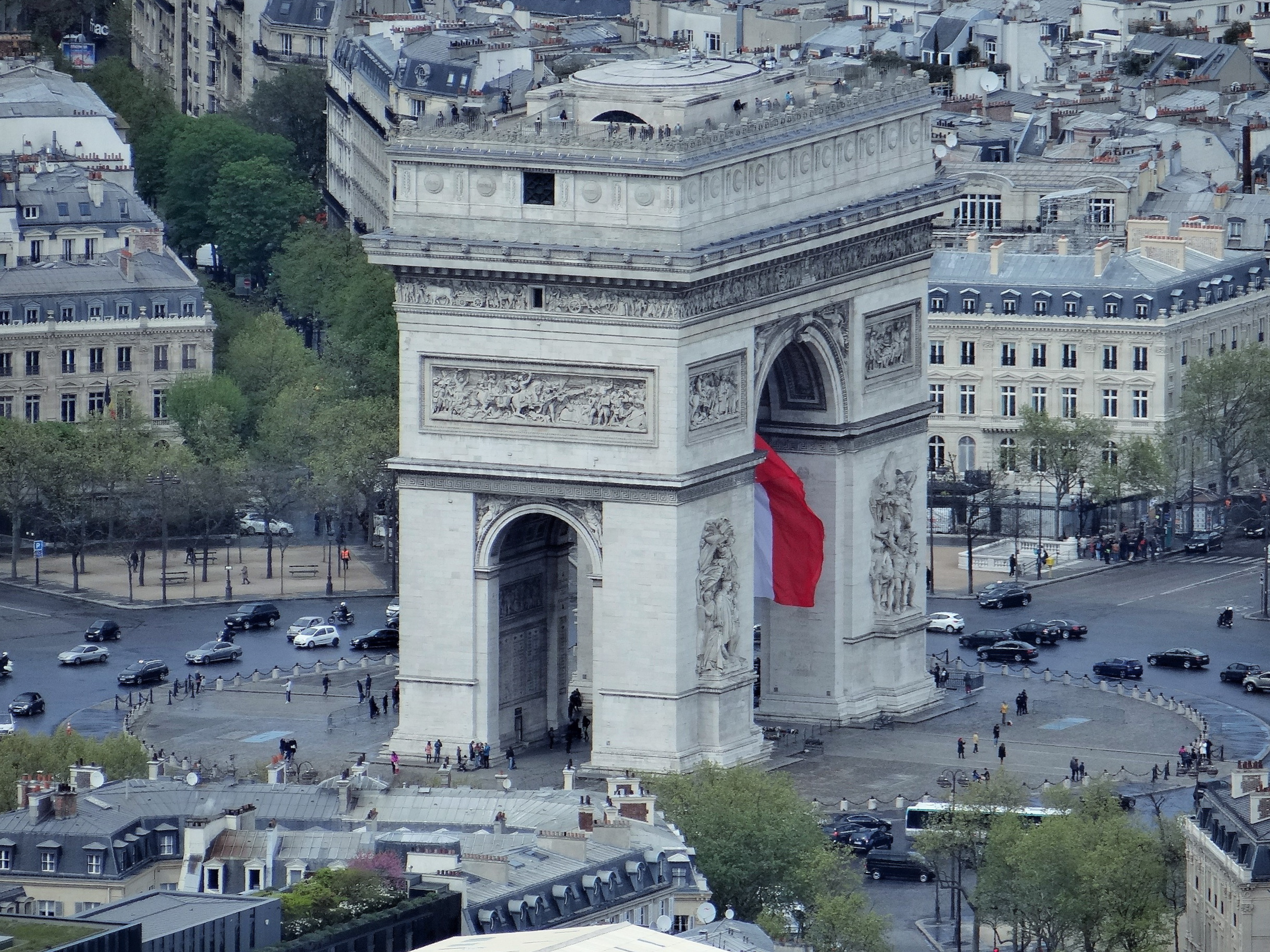 Arc de triomphe pris depuis la tour Eiffel .